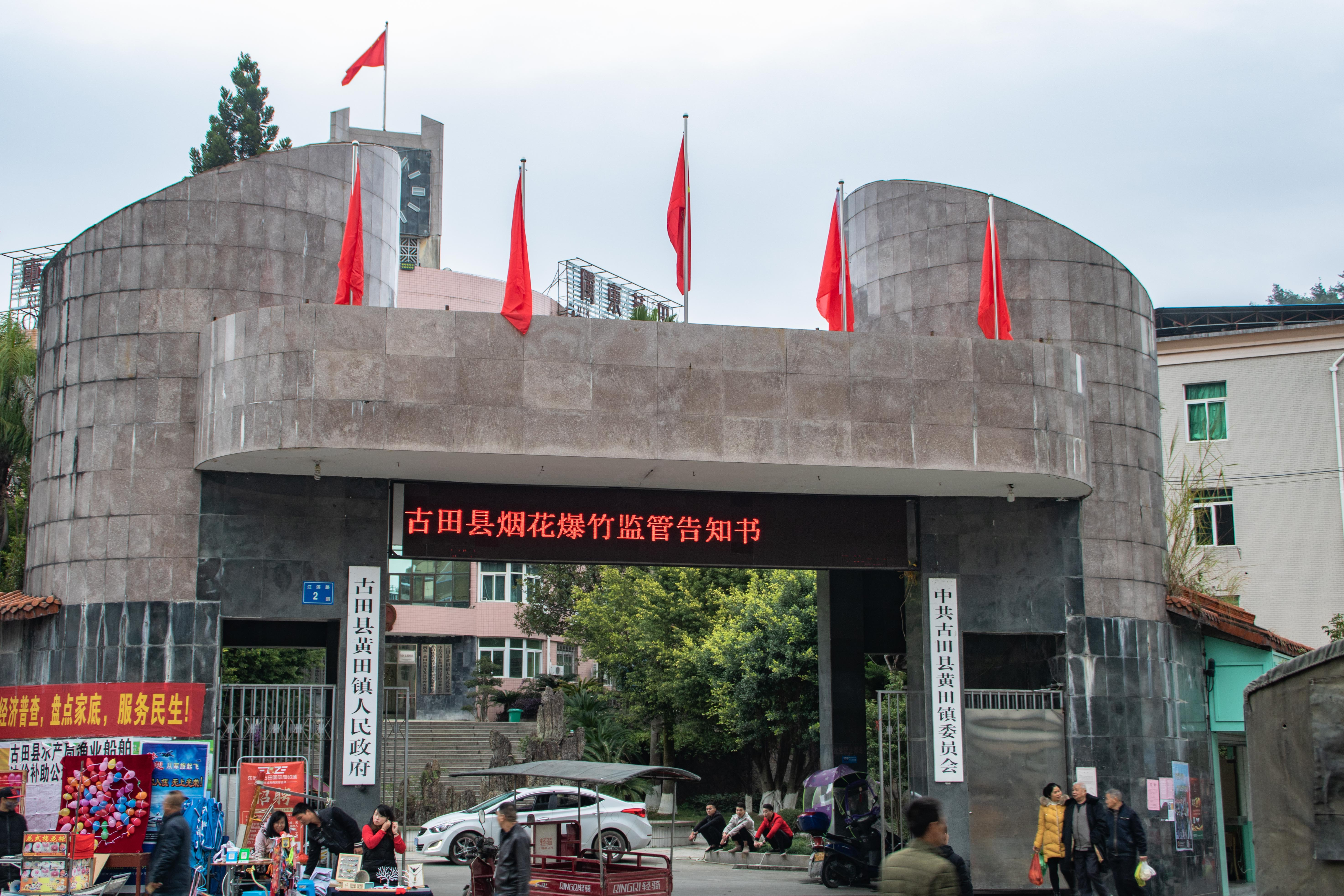 中文（中国大陆）: 古田县黄田镇人民政府